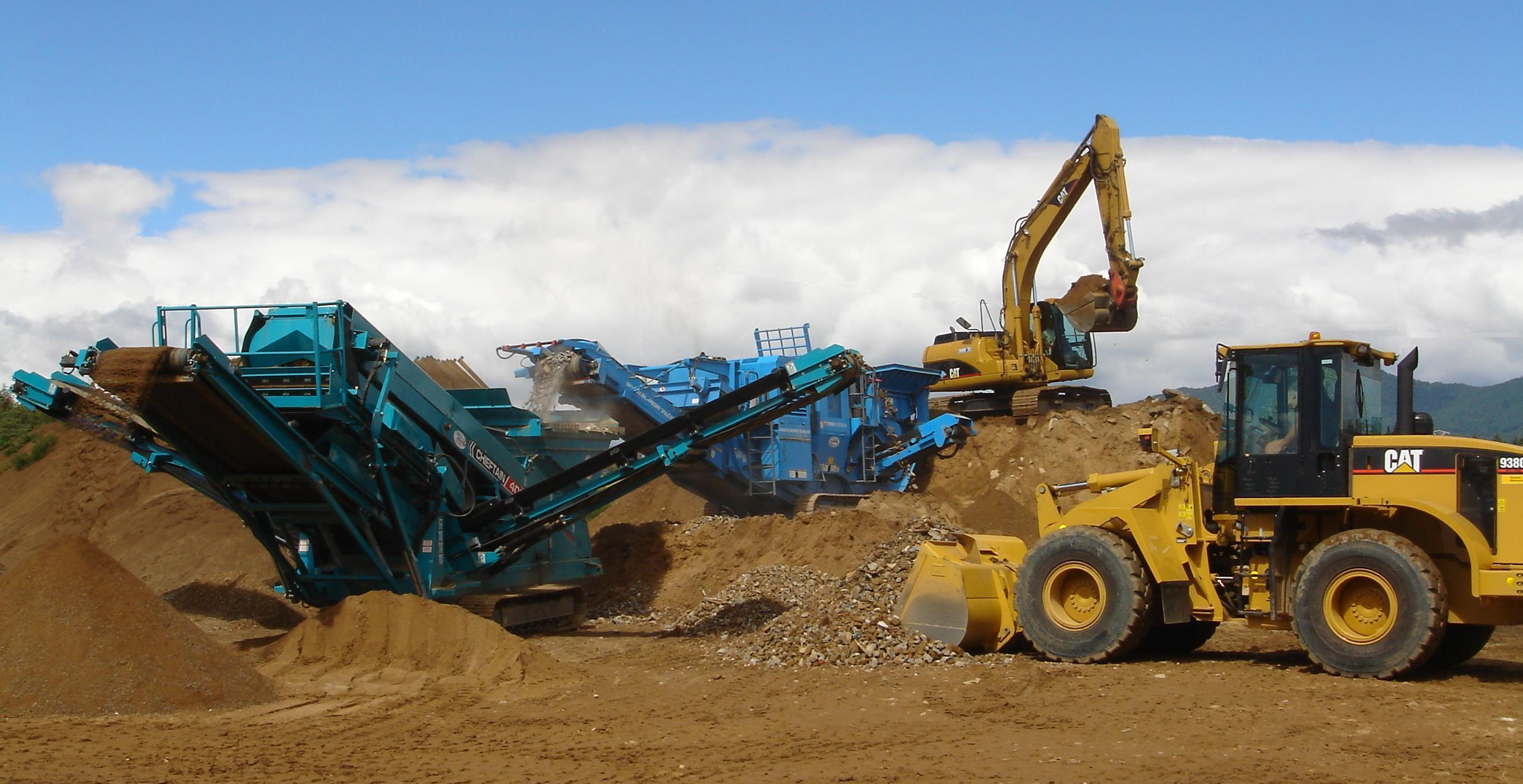 Saint-Romain d'Ay Ducoin